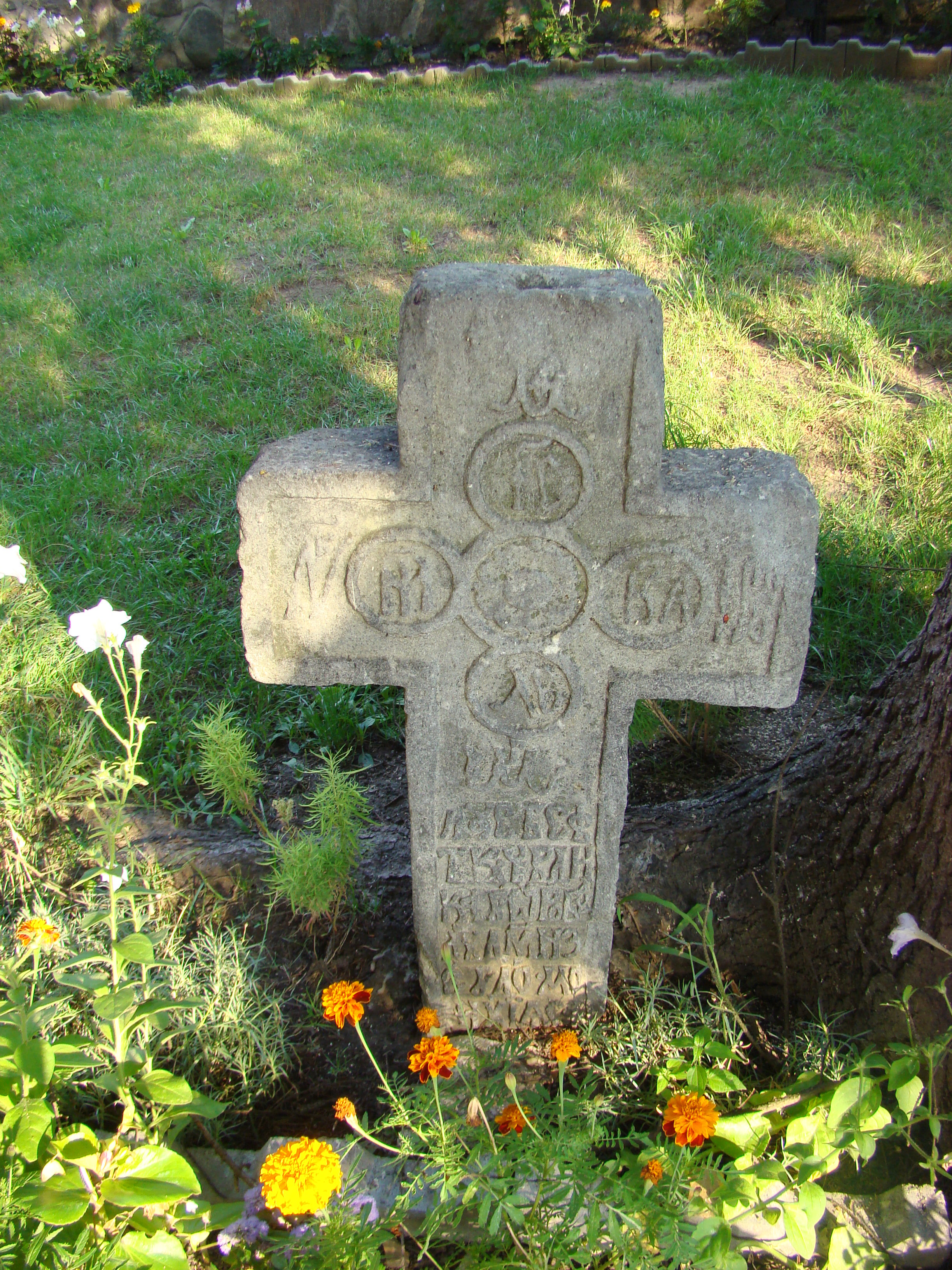 Cruce de piatră, Str. Cuza Vodă 134, la 5 m S de biserica "Adormirea Maicii Domnului"-Olari